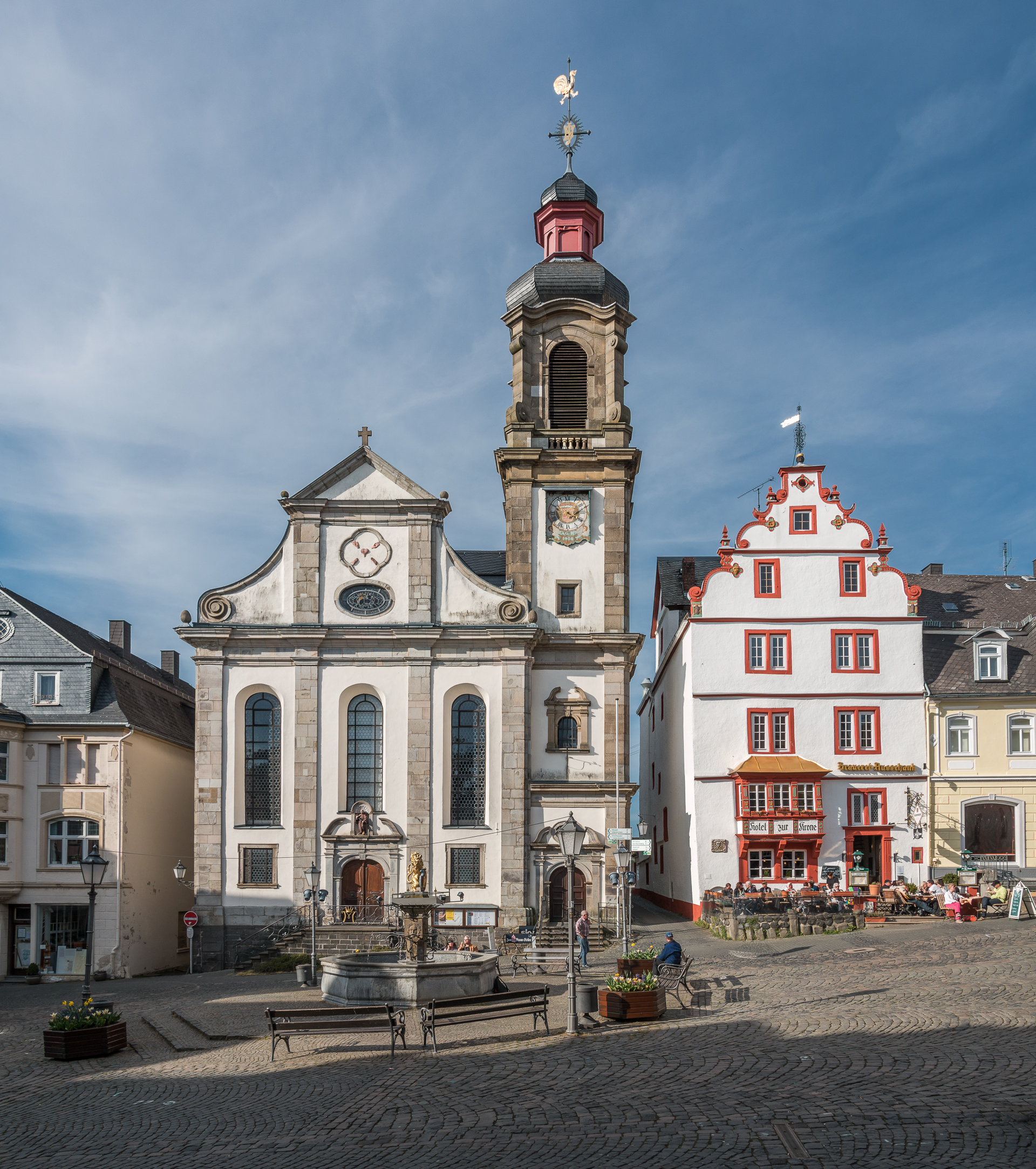 Die Franziskanerkirche Maria Himmelfahrt und das Hotel zur Krone am Alten Markt in Hachenburg im Westerwald